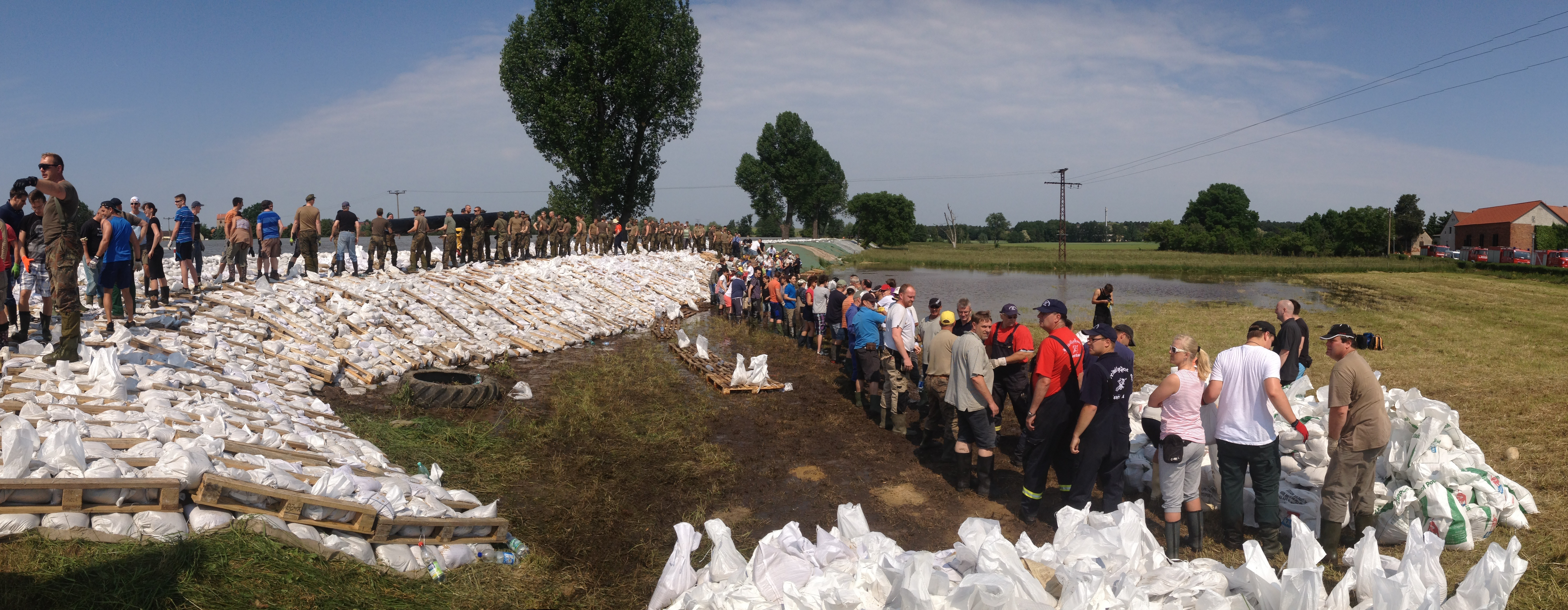 Helfer stabilisieren einen Deich in Lostau bei Magdeburg